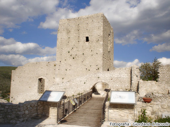 Buccino Castle, Italy